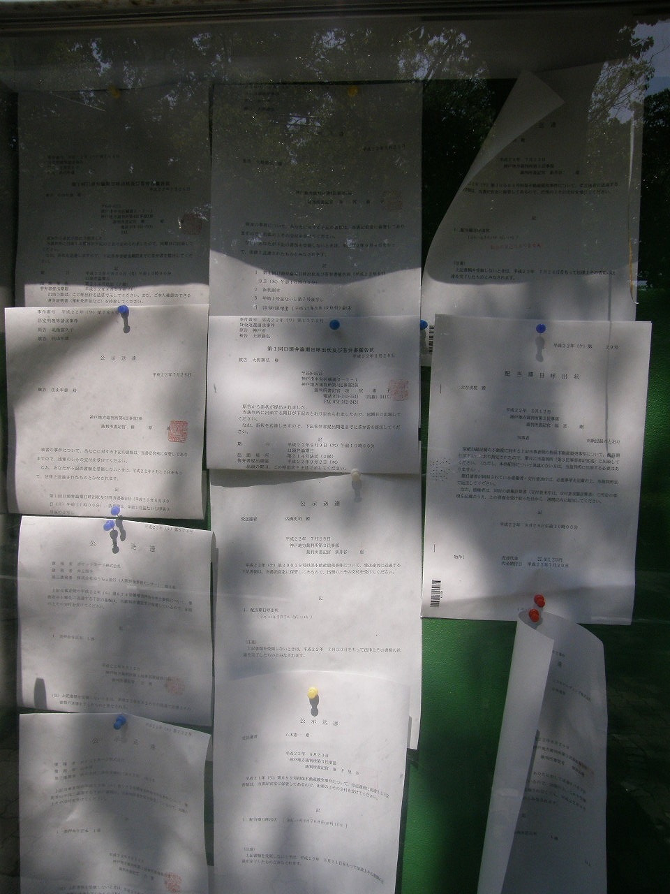 公示送達ー神戸地方裁判所前